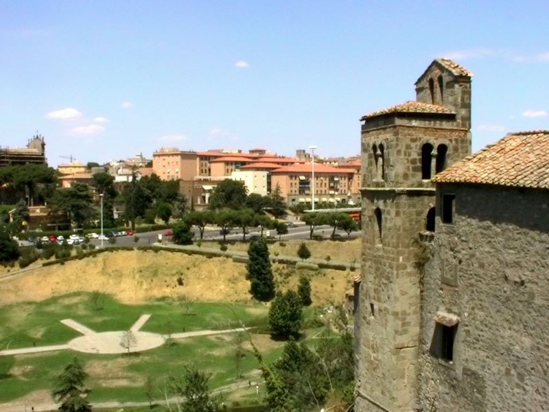 Viterbo, Lazio, Italia